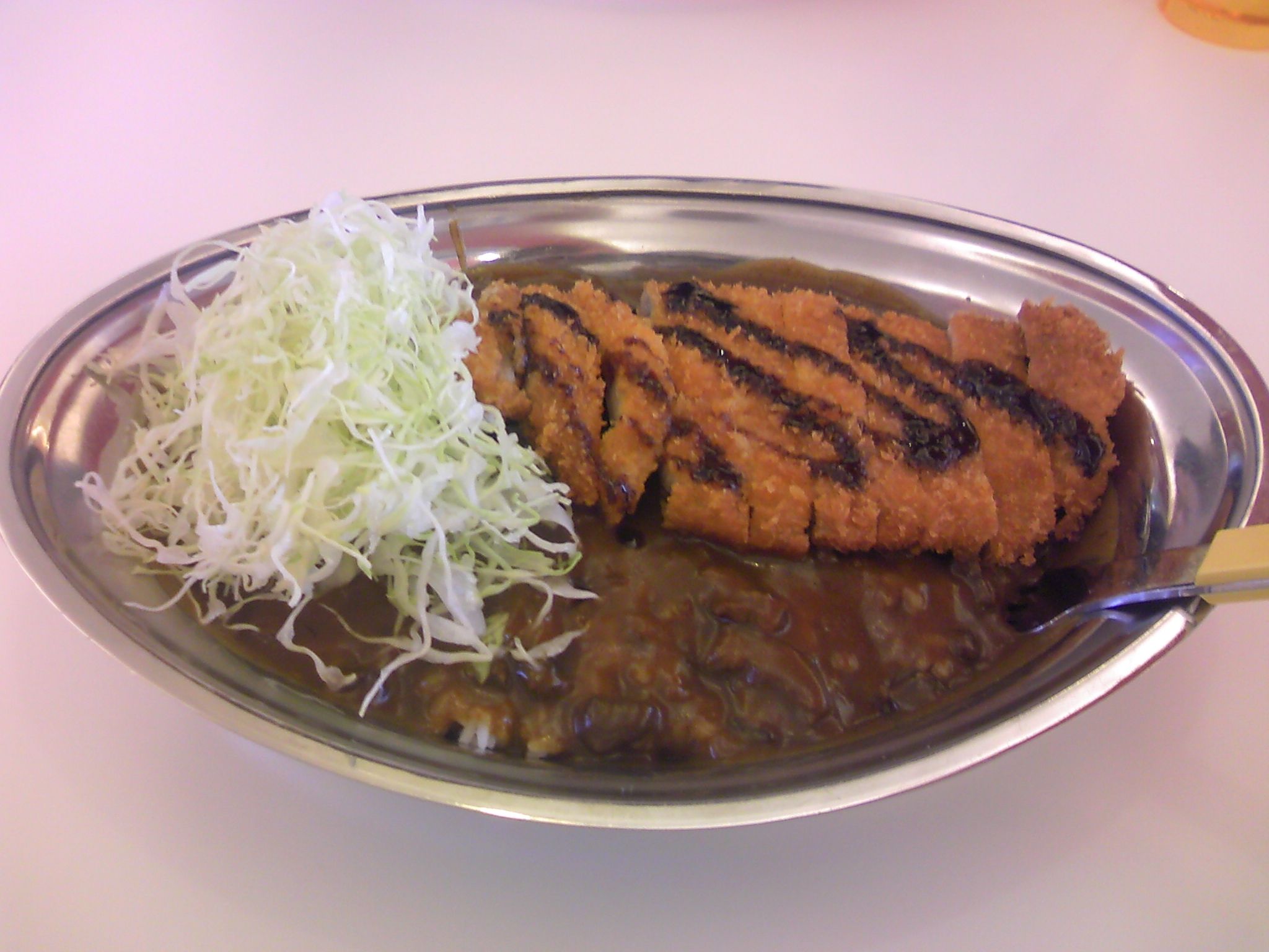 チャンピンカレー カツカレー